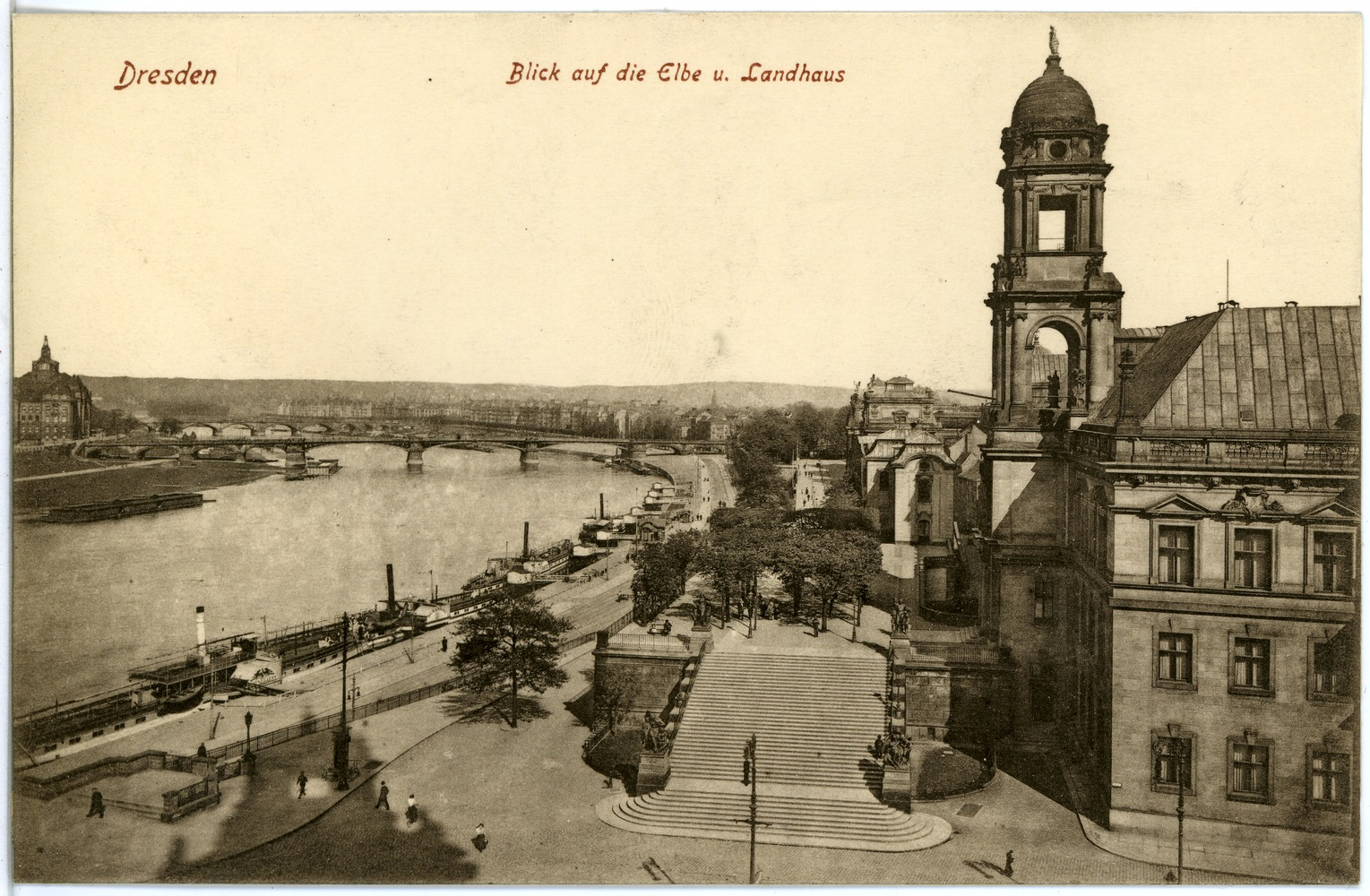 Dresden; Blick auf die Elbe und Landhaus This postcard is from publisher Brück & Sohn in Meißen ( postcard has a unique number 18951 and is available in a higher resolution at the publisher. This images was uploaded in a cooperation project between Wikipedians and the publisher.